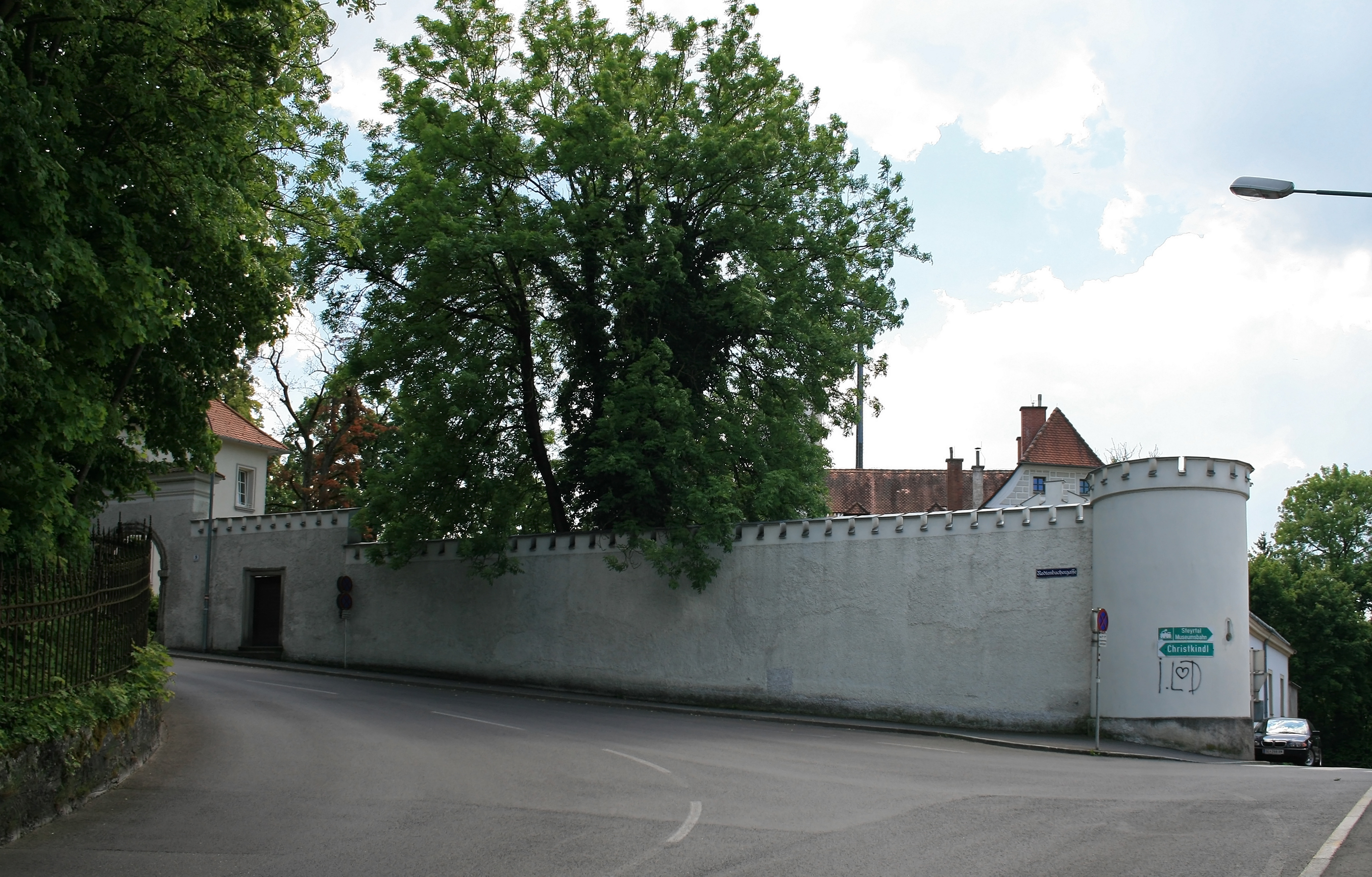 Die ehemalige Befestigungsmauer von Schloss Engelsegg zur Redtenbachergasse hin